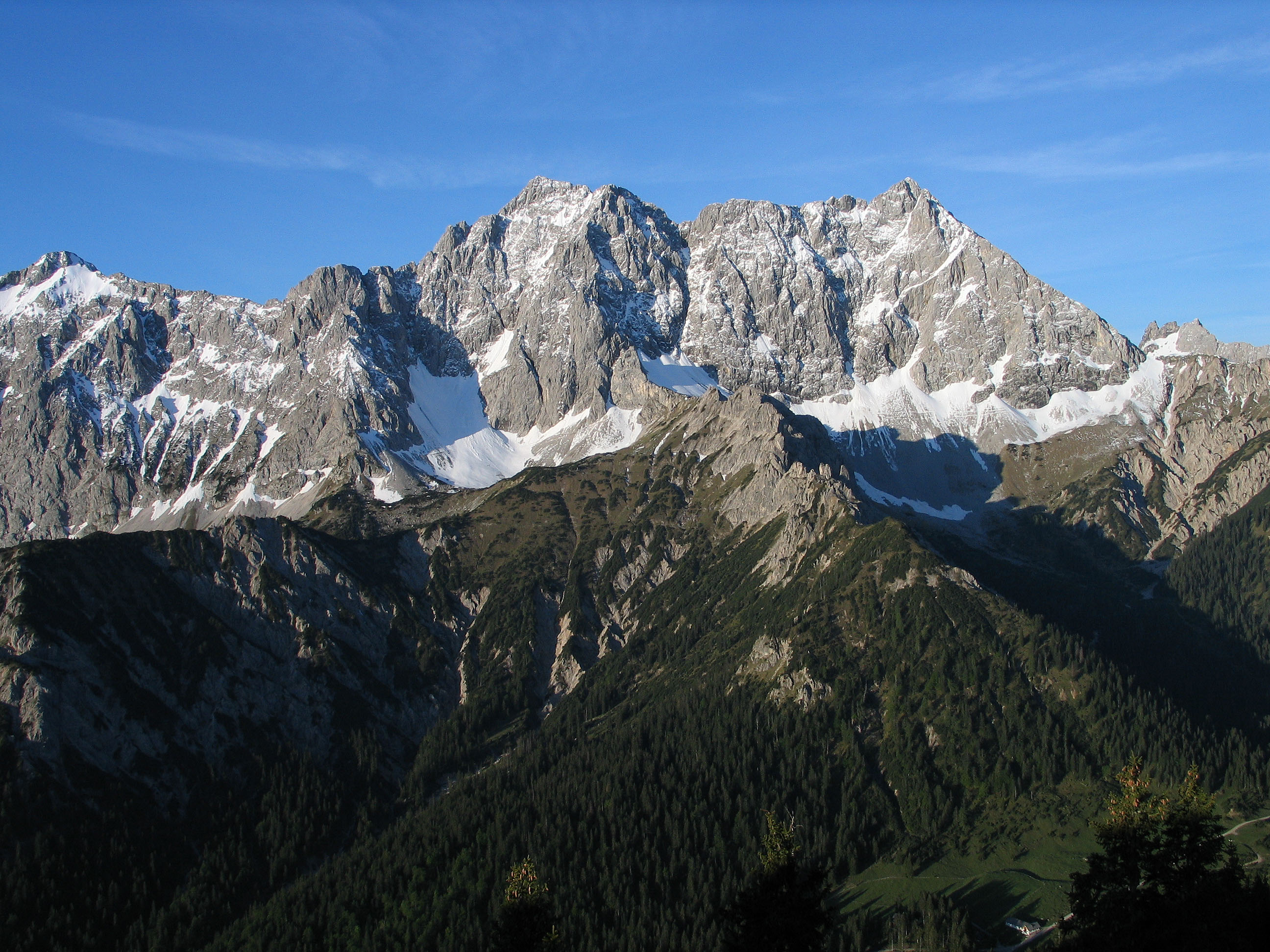 Hochkarspitze (2484 m) und Wörner (2476 m), Karwendel